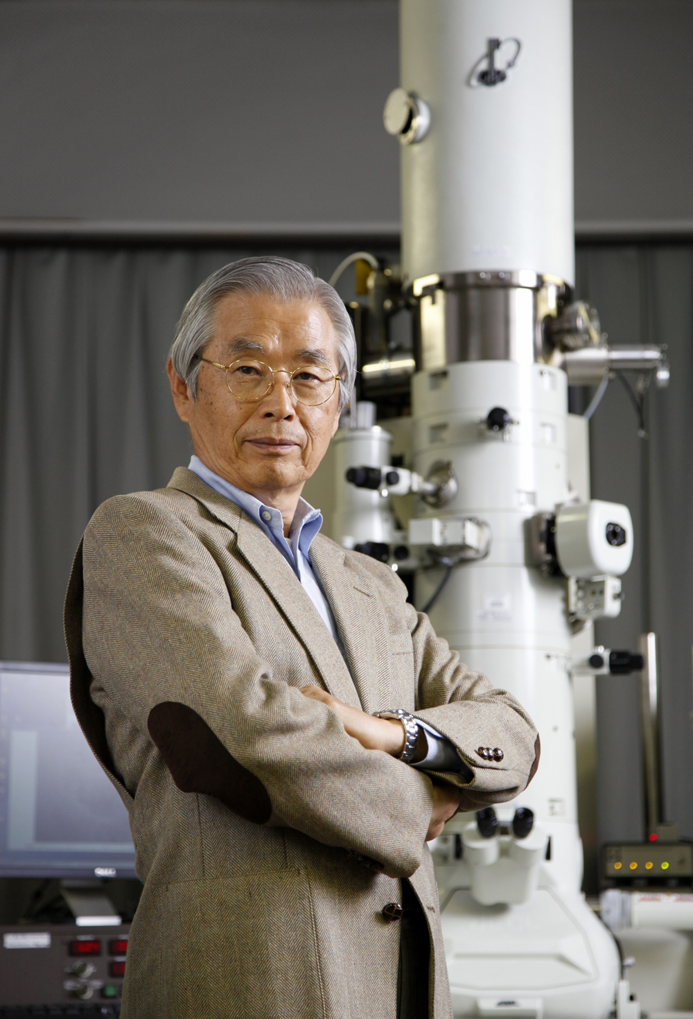 飯島澄男 名城大学のTEMと